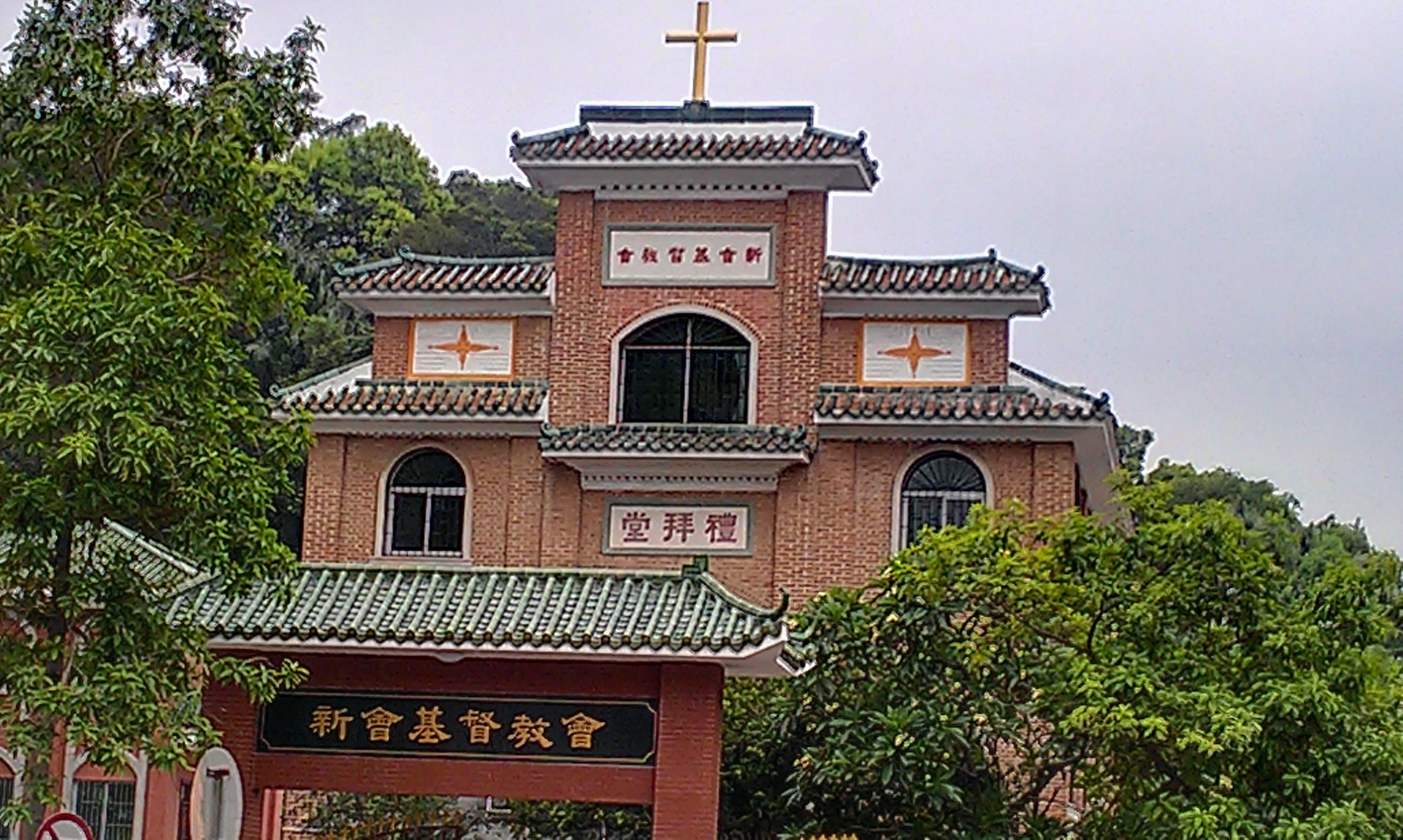 中文（香港）: 新會基督教會